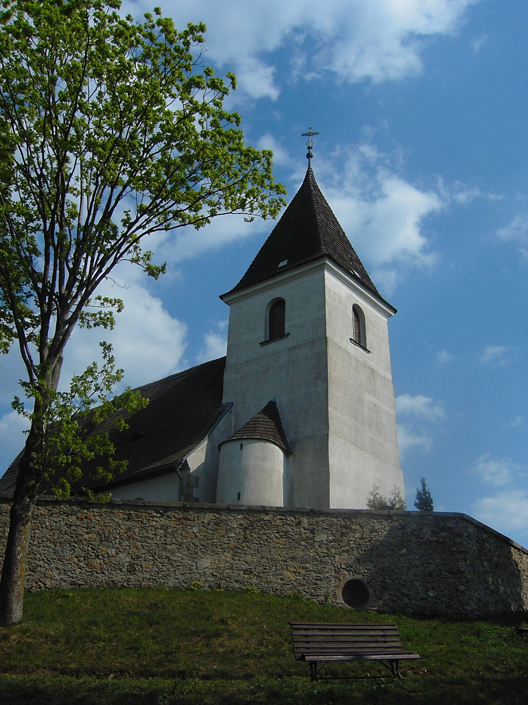 Kostel sv. Víta - Havlíčkova Borová